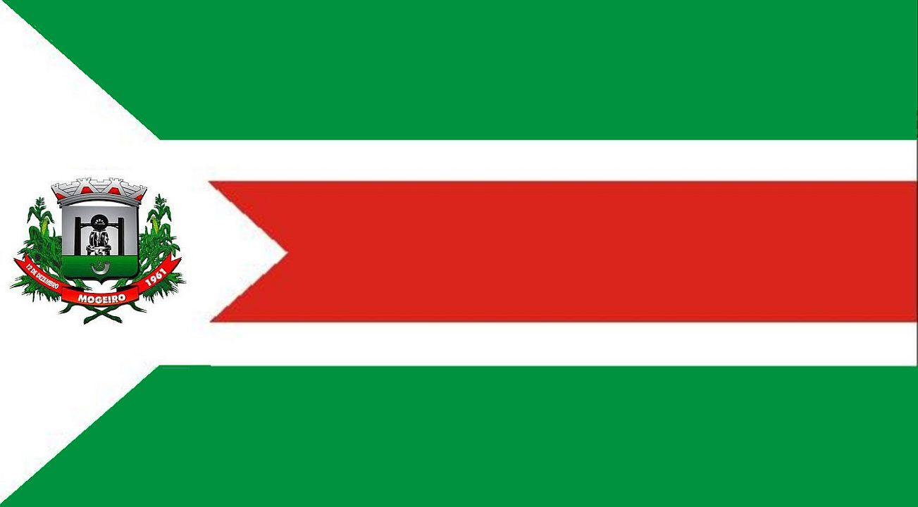 Bandeira do município de Mogeiro, no estado da Paraíba, Brasil.